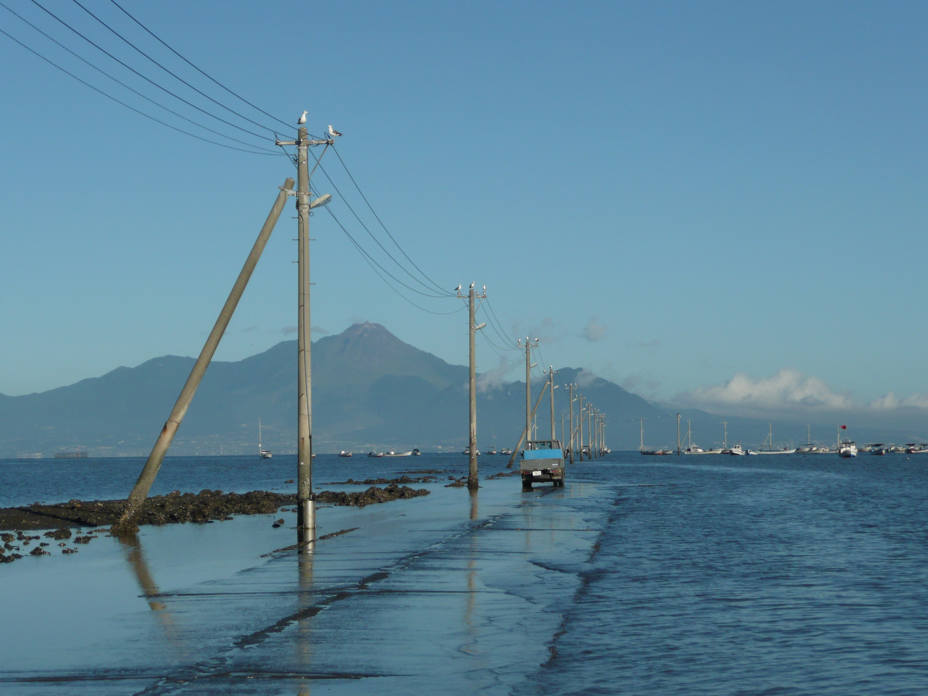 熊本県宇土市内にある長部田海床路